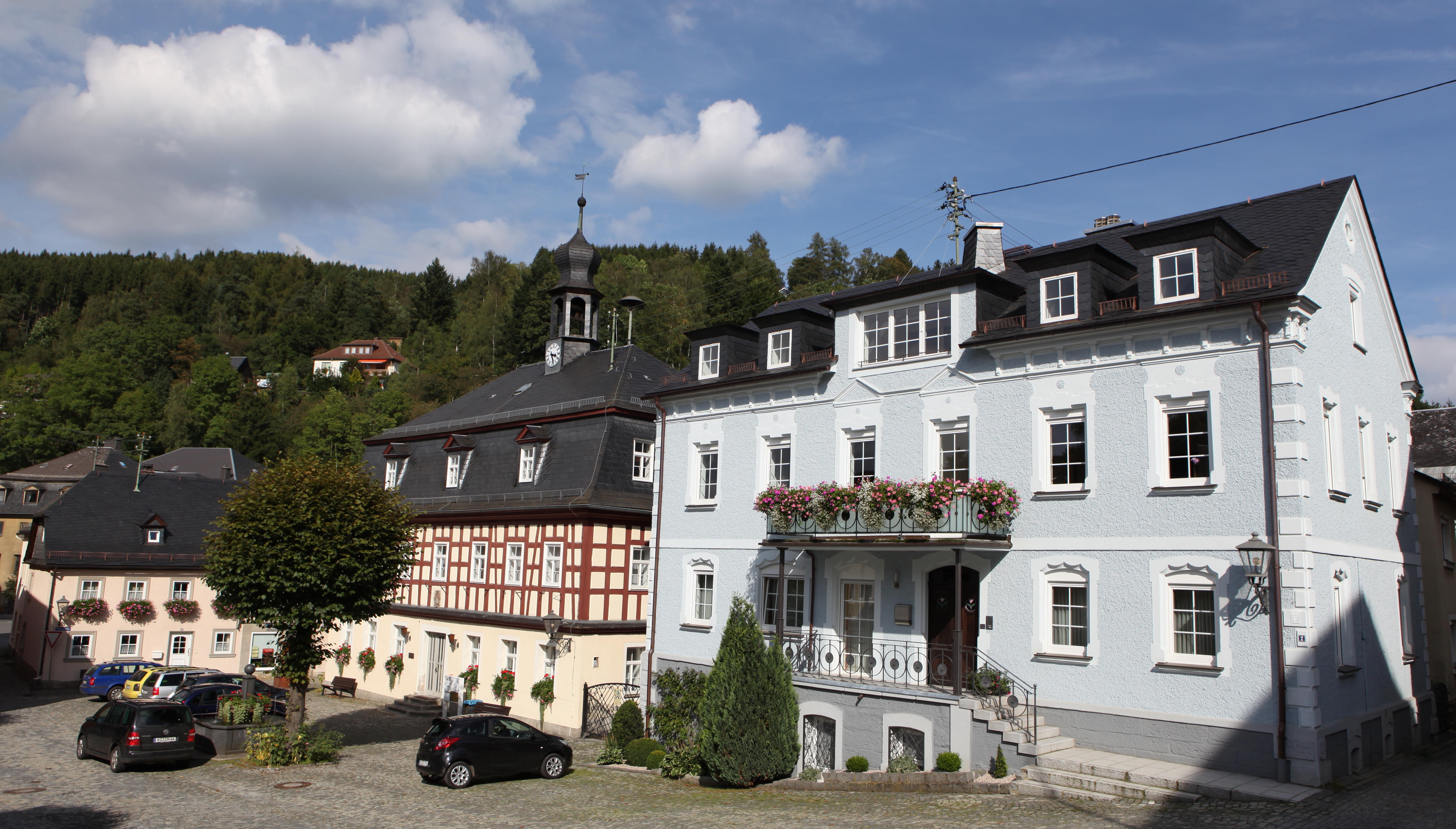 Marktplatz in Ludwigsstadt, Landkreis Kronach